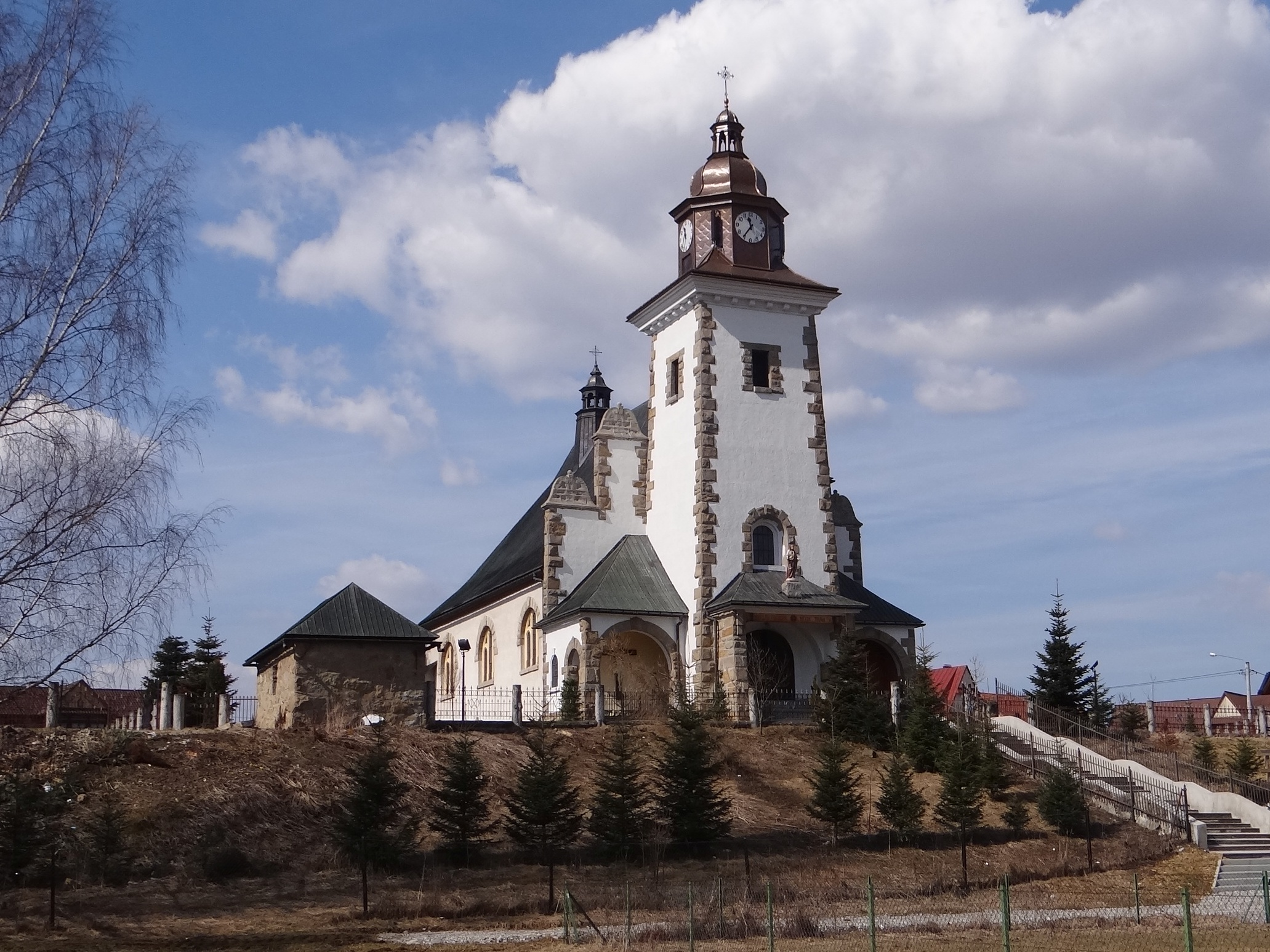 Kościół w Cichem. Parafia Miętustwo